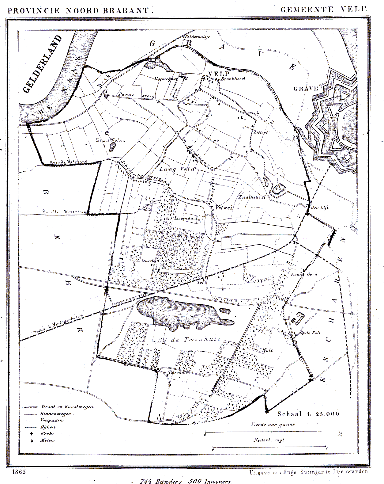 Nederland, Noord-Brabant, Gemeente Velp